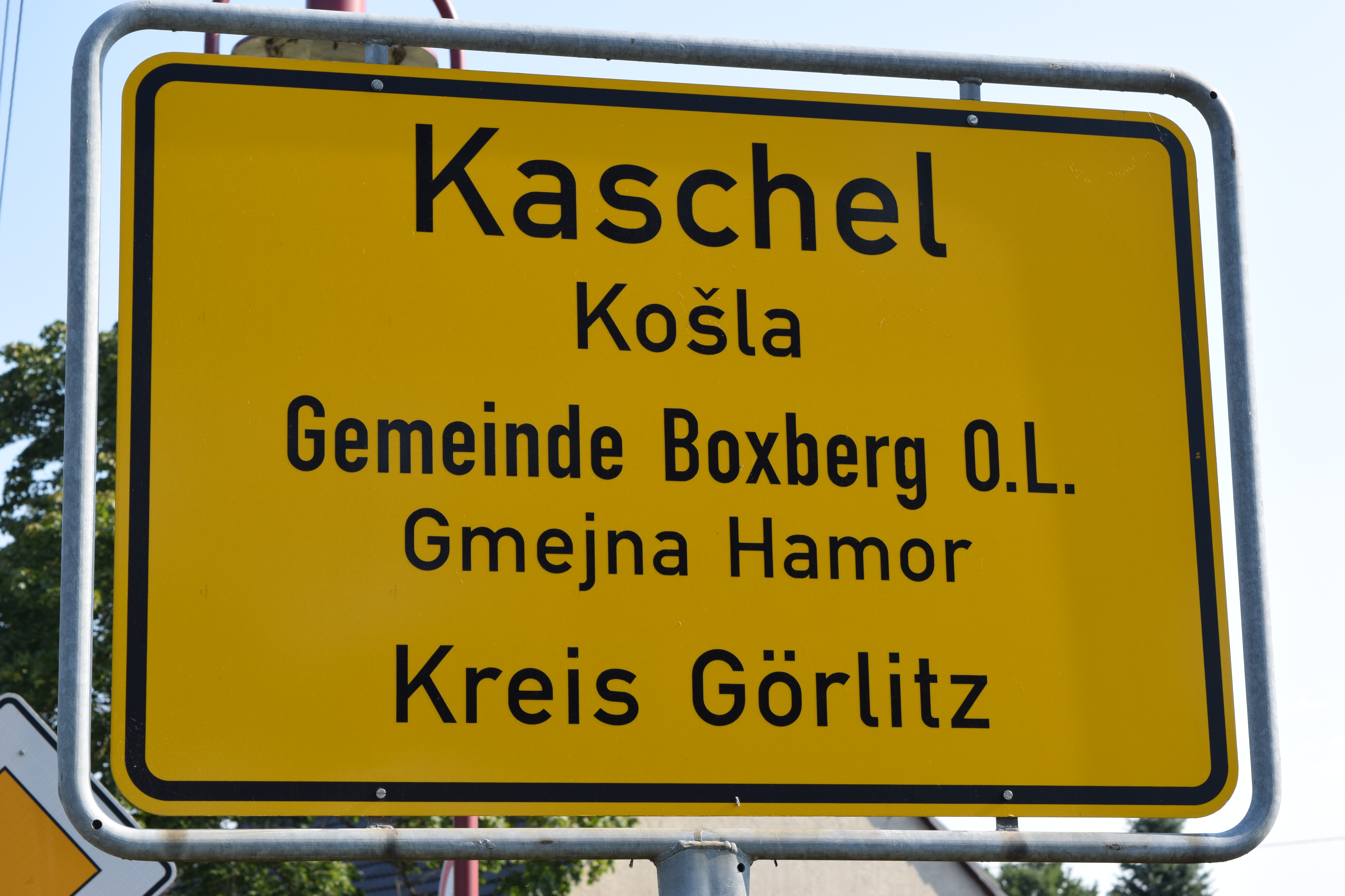 Ortstafel KaschelHornjoserbsce: Wjesna tafla Košle